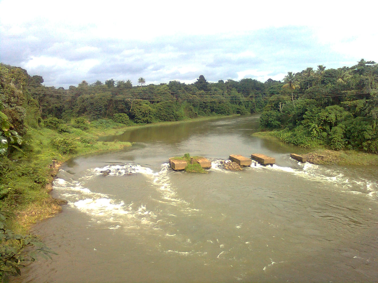 കല്ലടയാറിന്റെ ഒരു ദൃശ്യം ഏനാത്തുനിന്നും